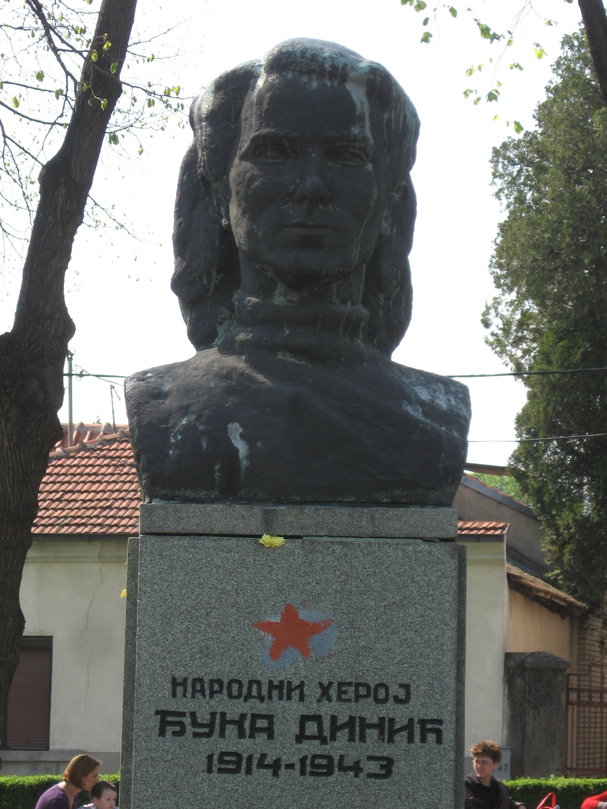 Bista Đuke Dinik u Nišu. Snimljeno u aprilu 2010.